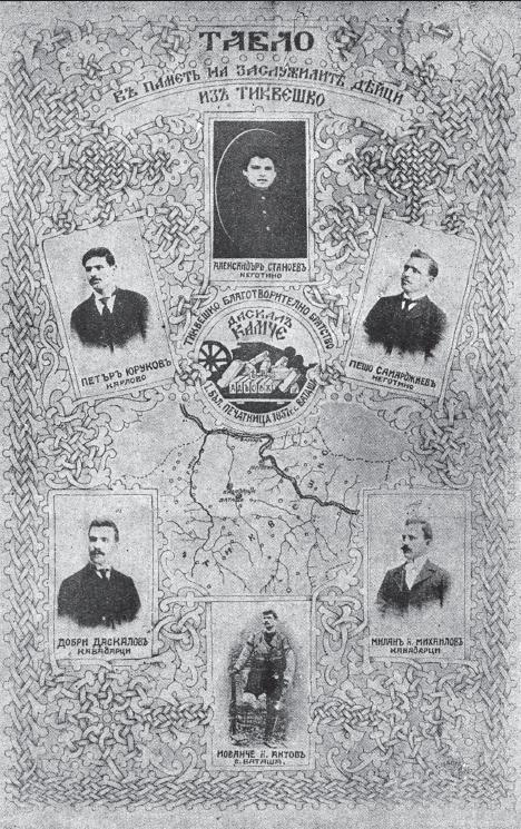 Табло на Тиквешкото благотворително братство "Даскал Камче".